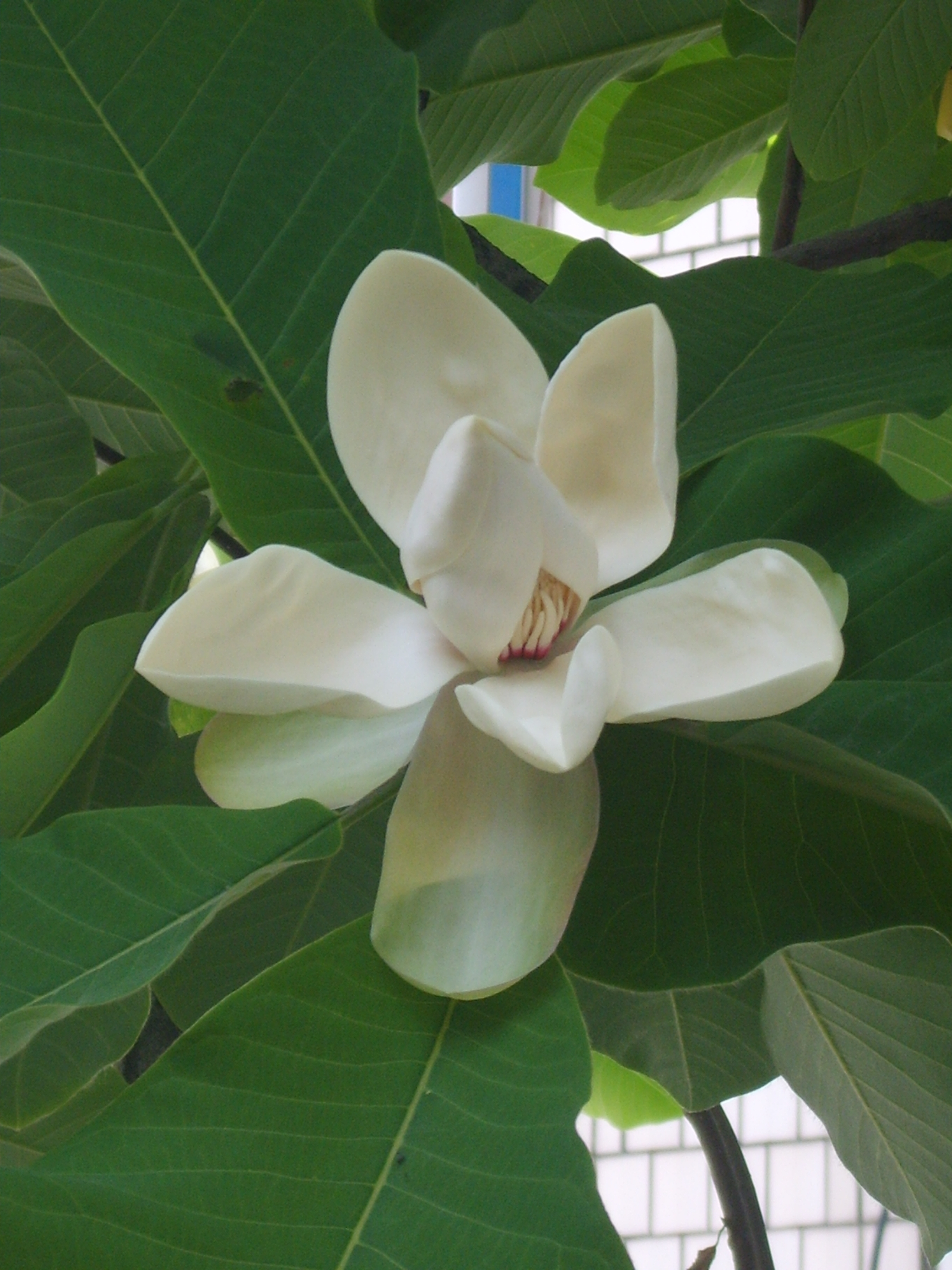 Magnolia obovata in Incheon Korea. 인천 부평, 임소아과 뜰에 사는 일본목련 꽃